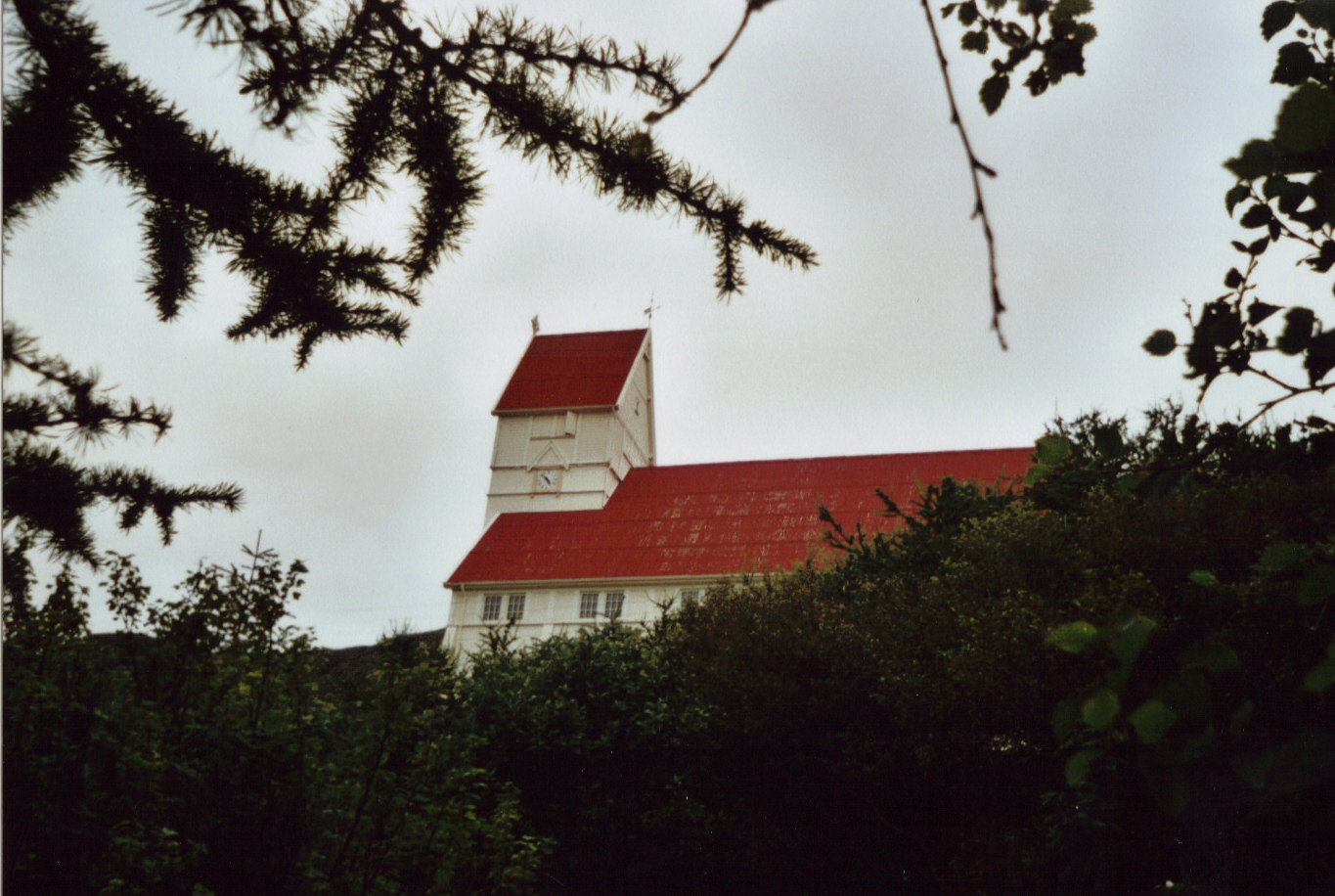 Kirche (1907) in Tvöroyri, vom Wald aus gesehen